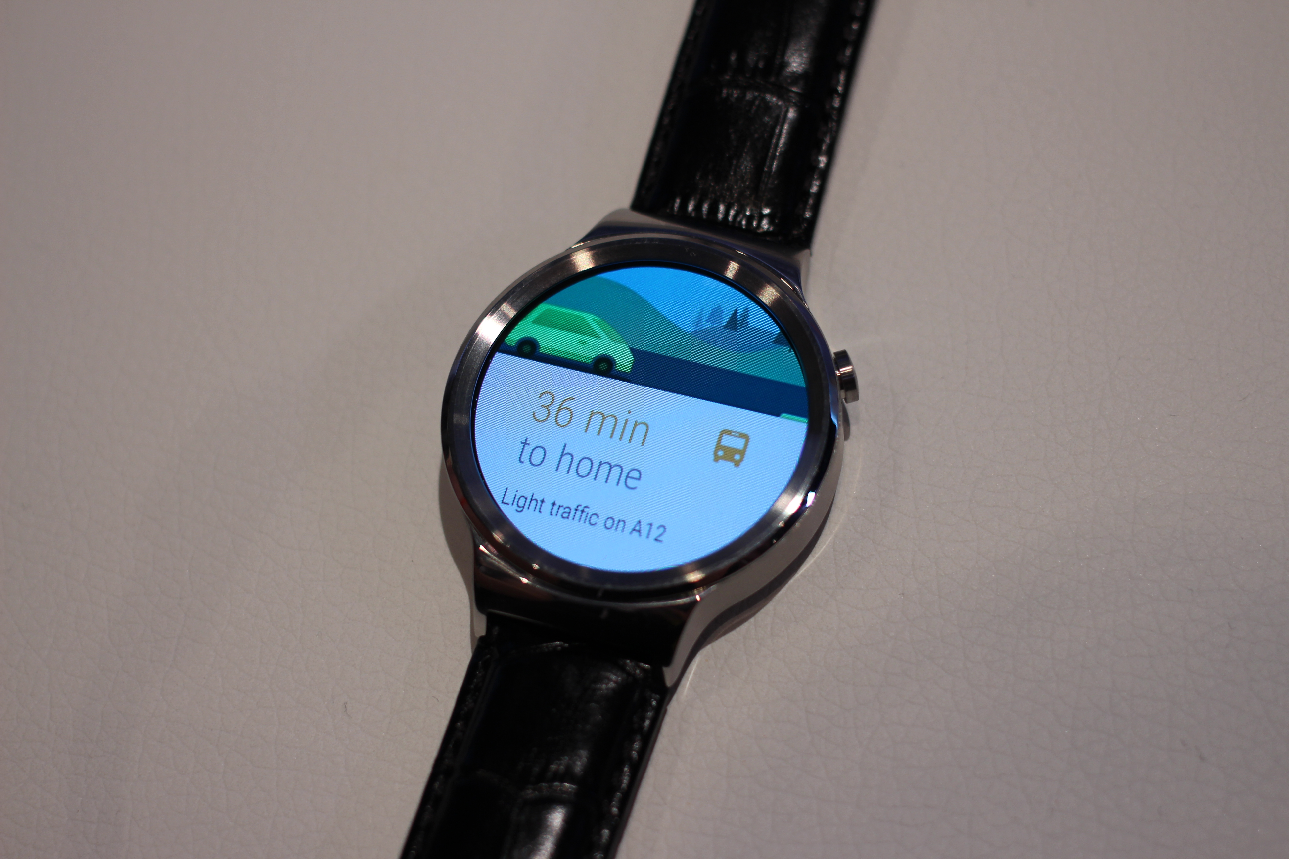 Huawei Watch